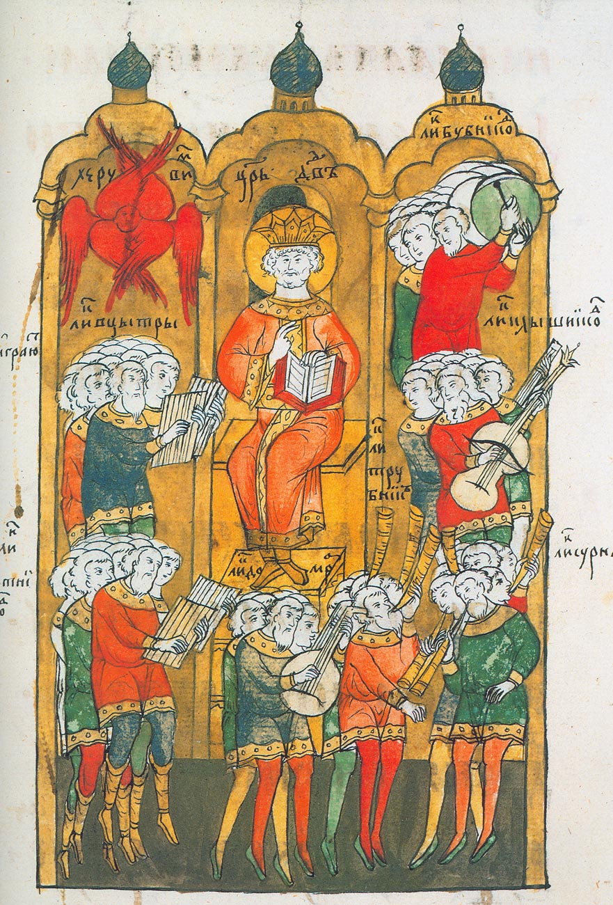 Давид-псалмопевец. Годуновская псалтирь. 1594 // Лихачев Д. С. Великая Русь: История и художественная культура 10-17 века. — М., 1994.